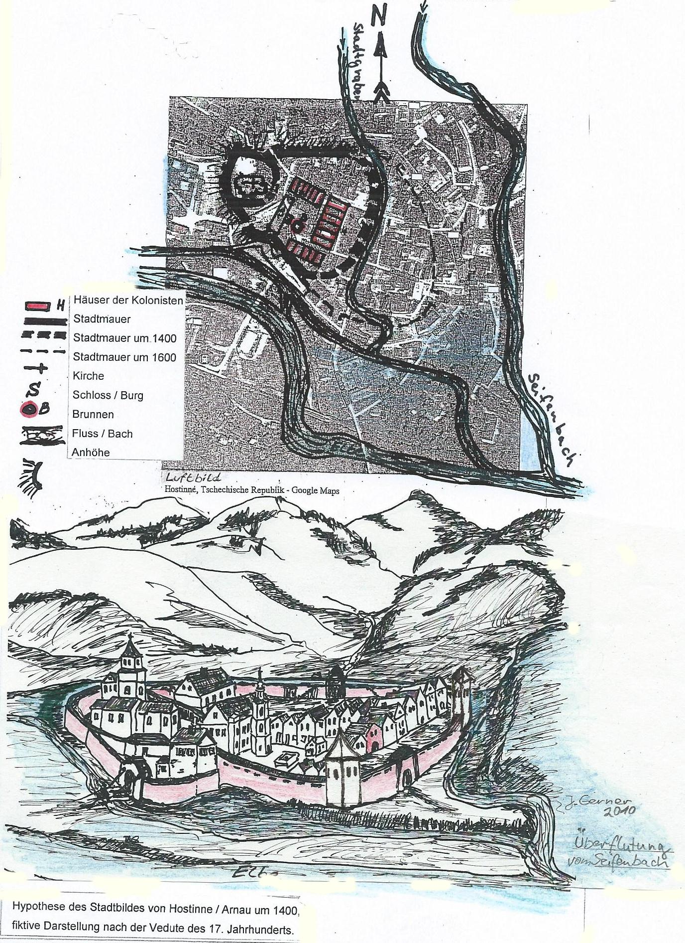 Die Darstellung basiert auf Daten der Geologie und Hydrologie der Stadt und der periphären Umgebung. Der Entwurf des fiktive Stadtbildes um 1400 ist mit Konsultationen von Geodäten und einem Hydrologen entstanden um die These auf ein wissenschaftliches Fundament zustellen. Die geschichtlichen und städtebaulichen Aspekte der Zeit um 1400 wurden berücksichtigt. Die Legende der Grafik hilft dabei.